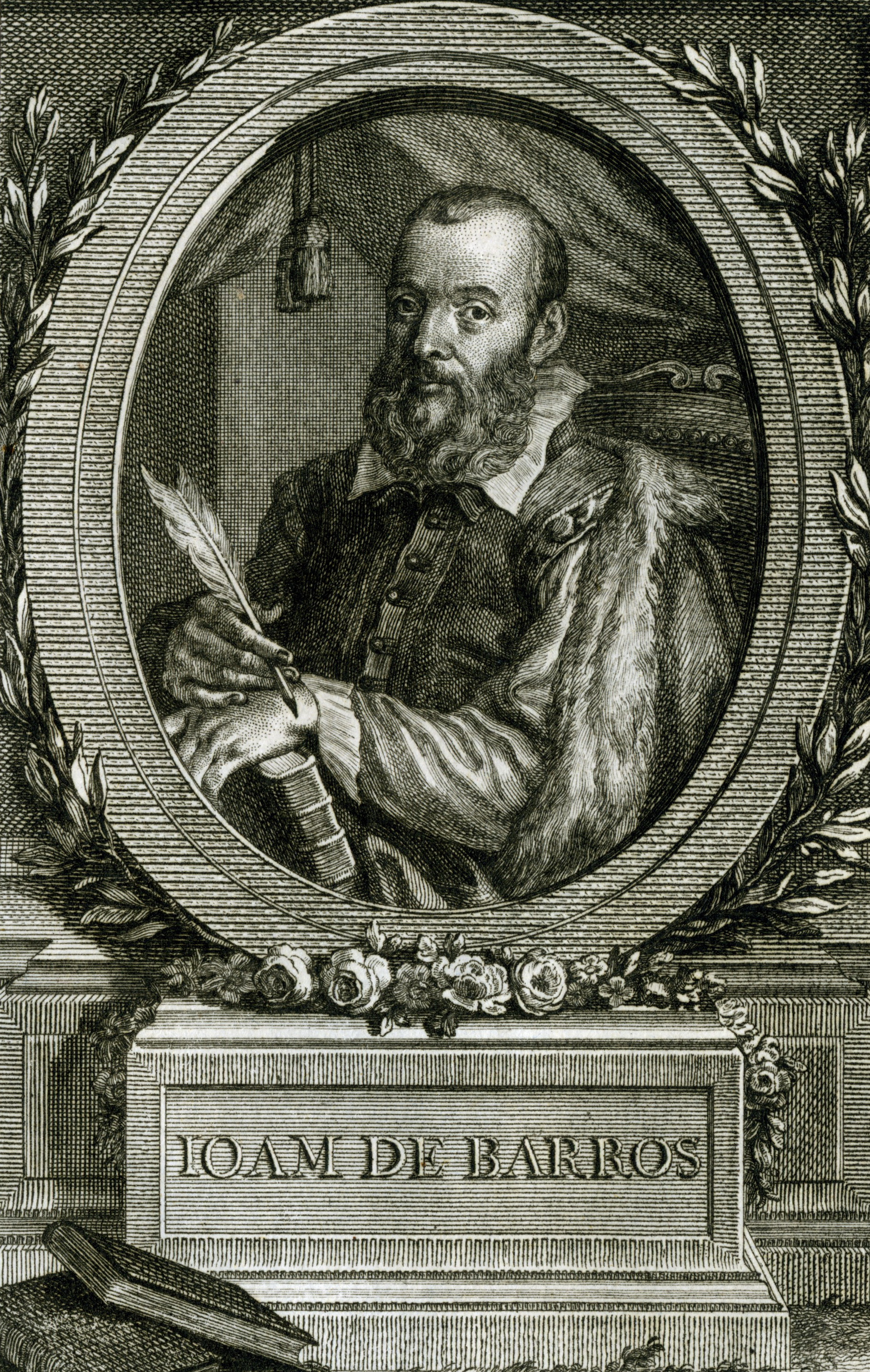 portrait de João de Barros, in Décadas da Ásia, Lisboa 1777-1778